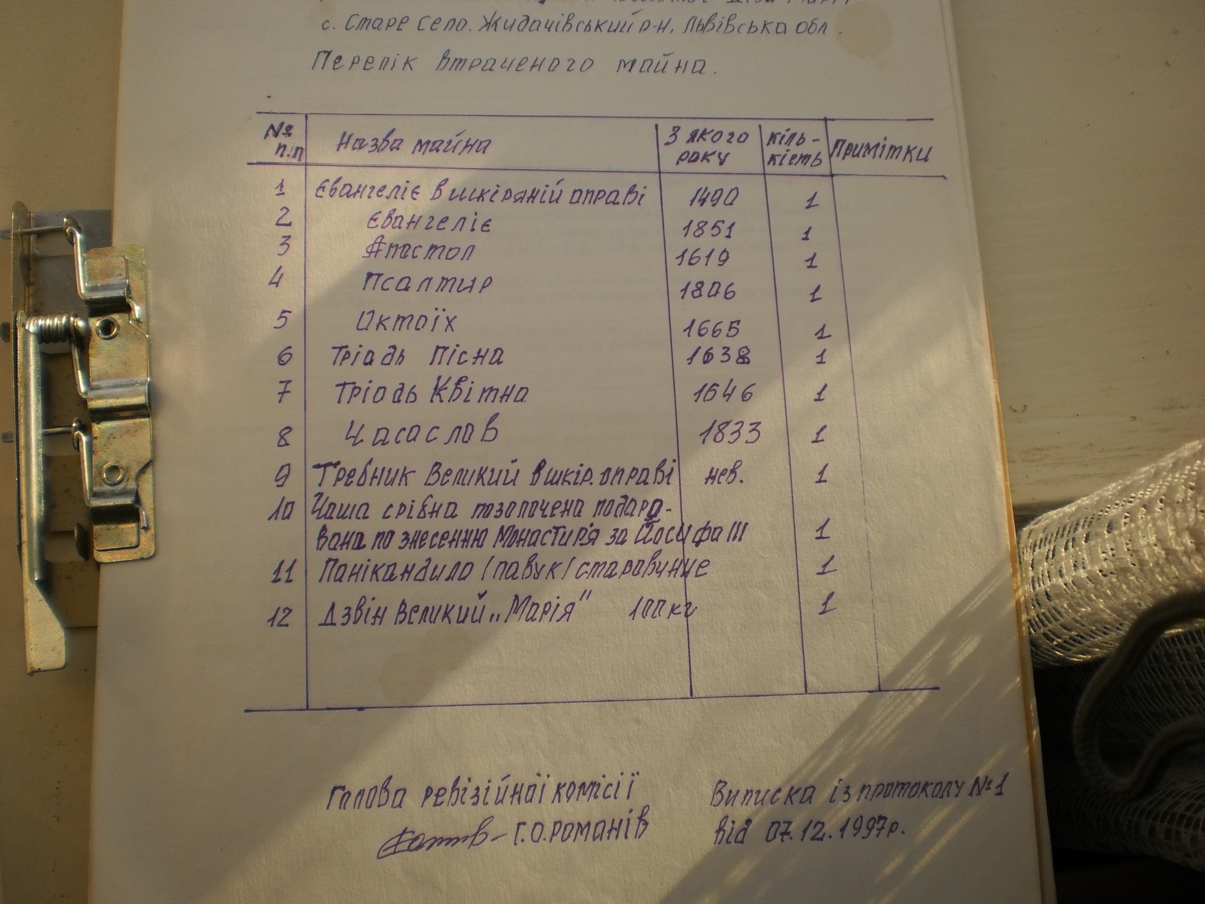 Фото №9.Перелік втраченого церковного майна .c.Старе Село.